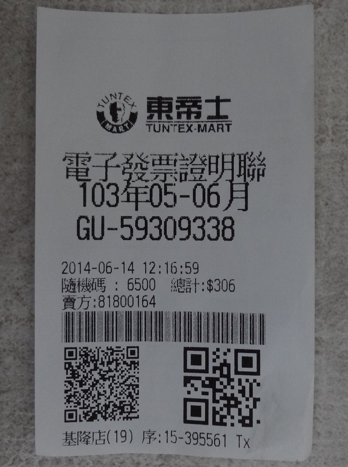 中文（台灣）: 東帝士量販店基隆店於2014年6月14日開立的紙本電子發票收執聯正面